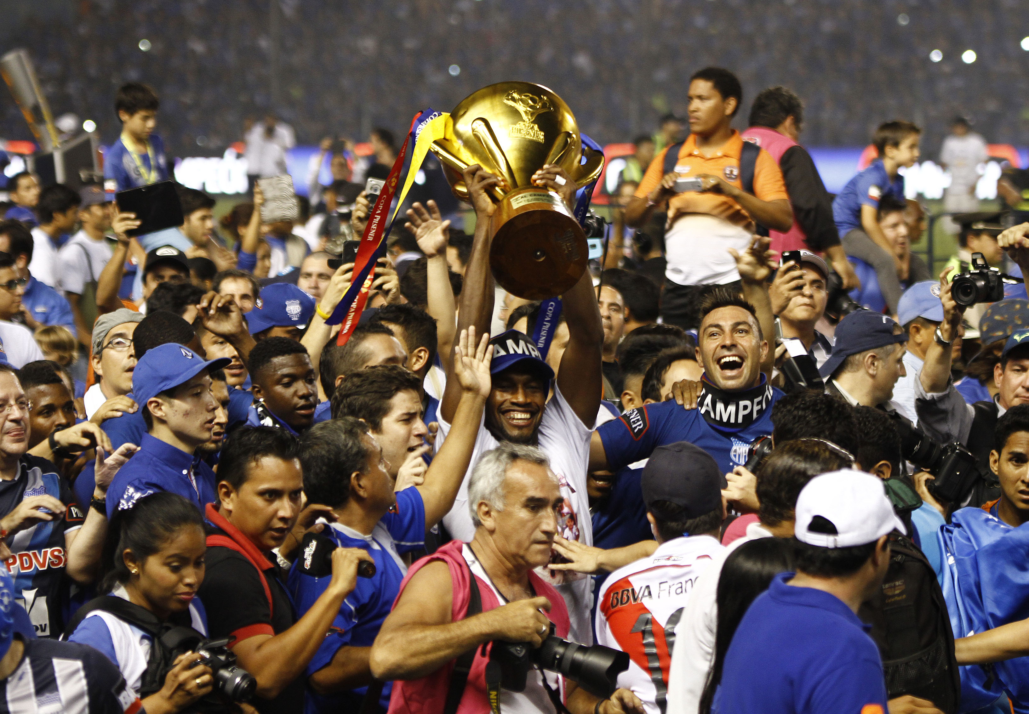 Guayaquil, Ecuador, 21 dic (ANDES).- El conjunto guayaquileño Emelec conquistó este domingo la edición 57 del campeonato ecuatoriano de fútbol. Foto: Micaela Ayala V./ANDES